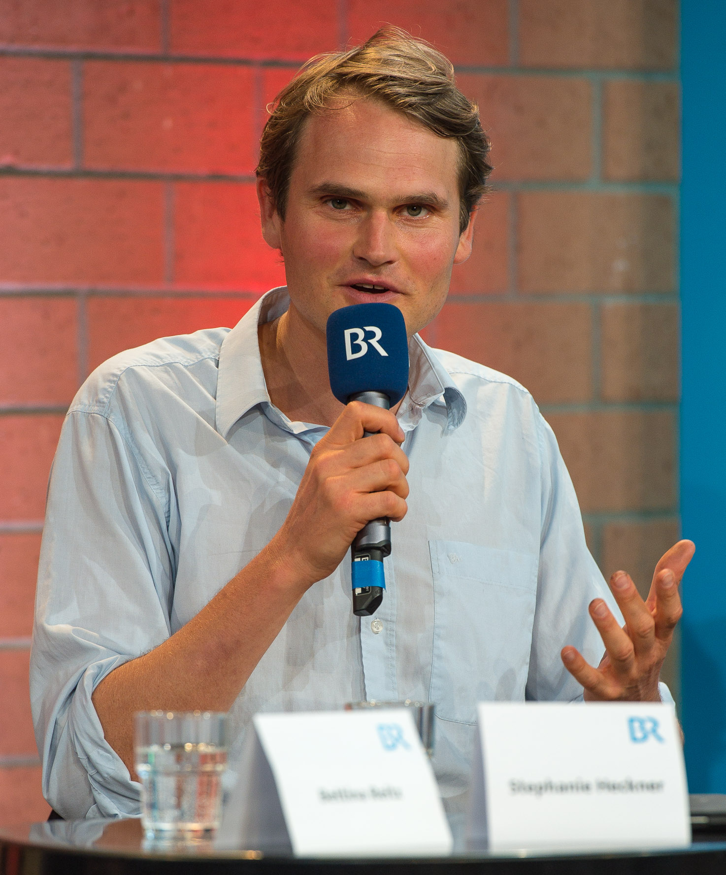 Bayerischer Rundfunk,Fabian Hinrichs,Franken-Tatort,Pressekonferenz,Tatort